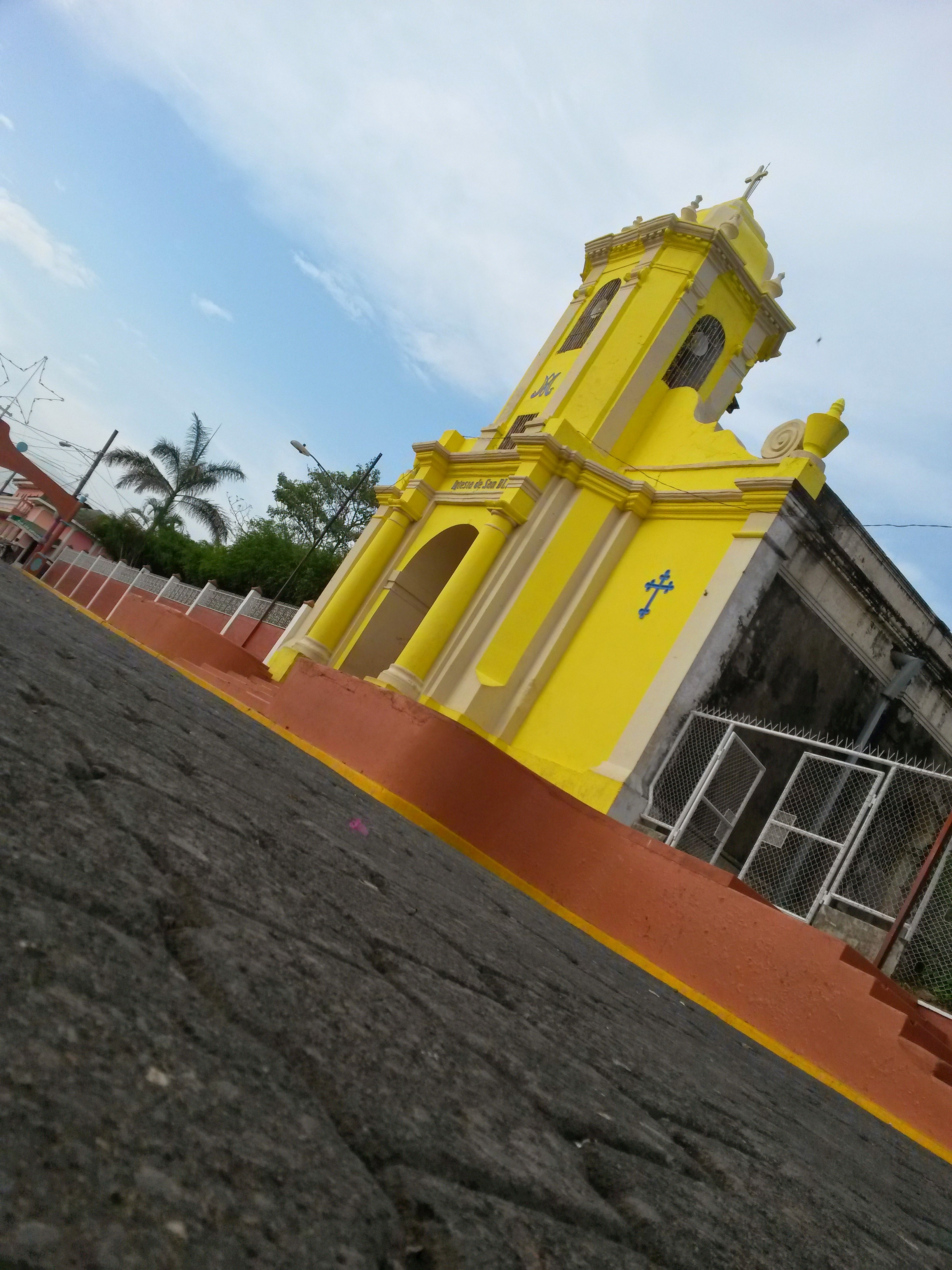 Iglesia Católica Romana San Blas